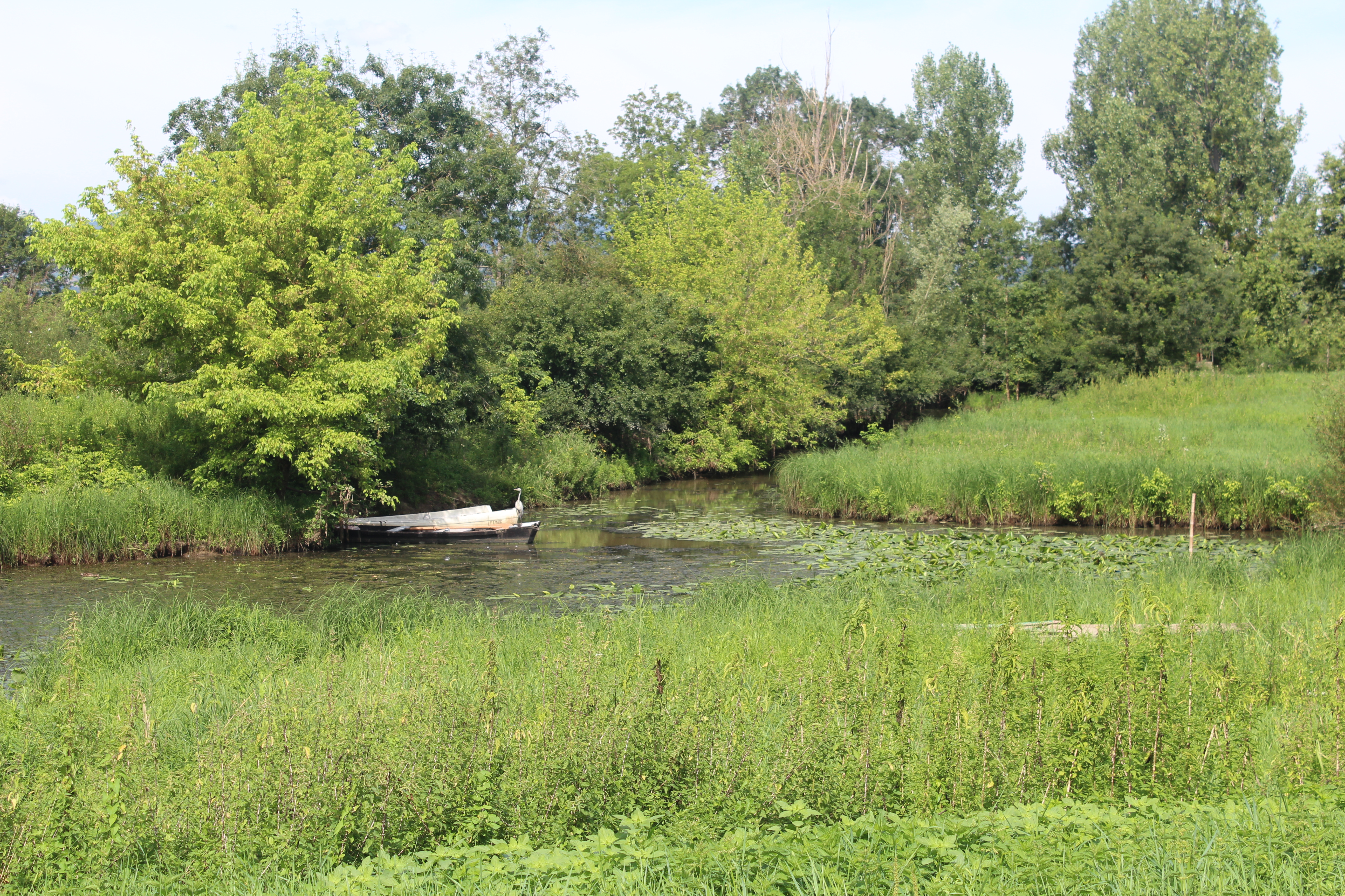 Cours d'eau dans les prairies inondables du val de Saône, au hameau d'Arciat, dans la commune de Cormoranche-sur-Saône.